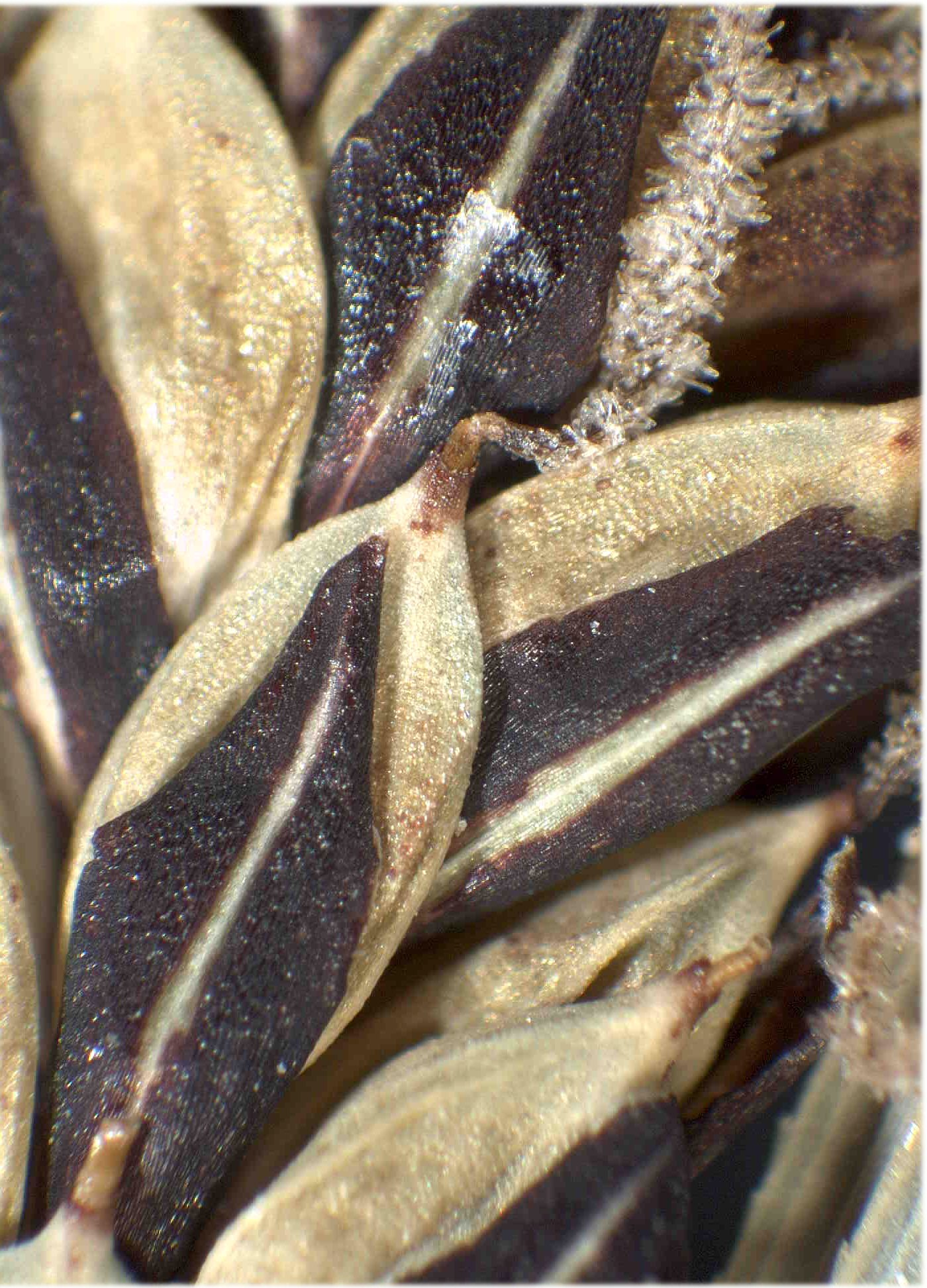 Carex acuta